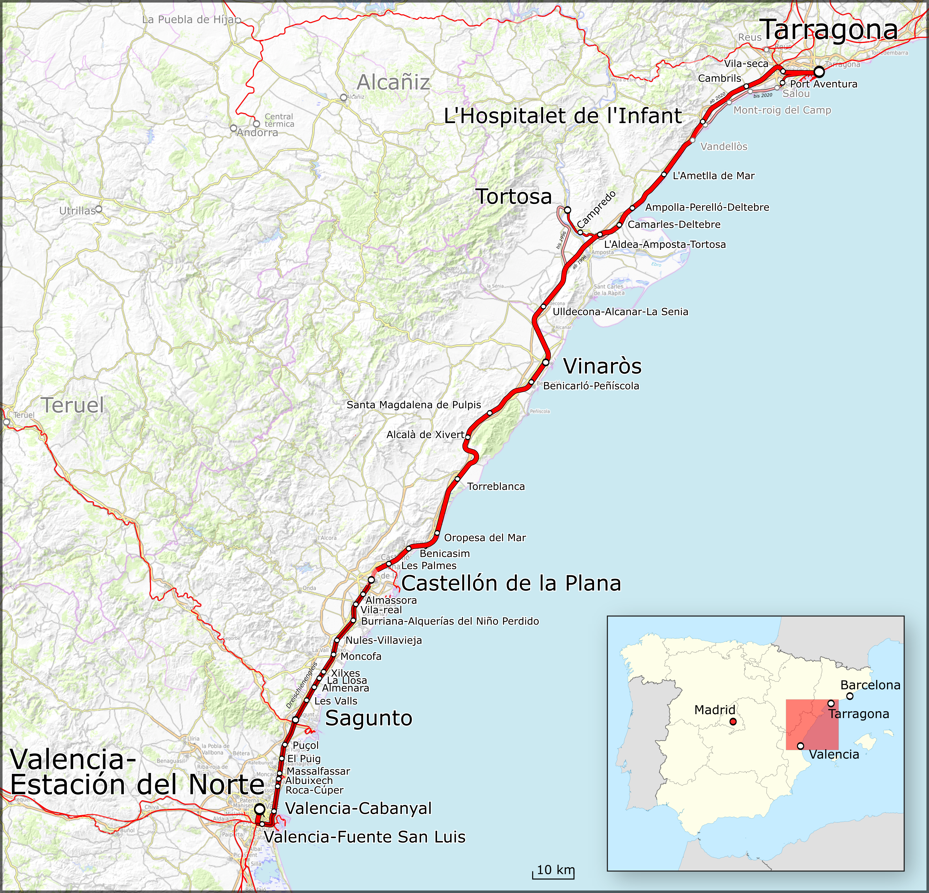 Karte der Bahnstrecke Tarragona–Valencia